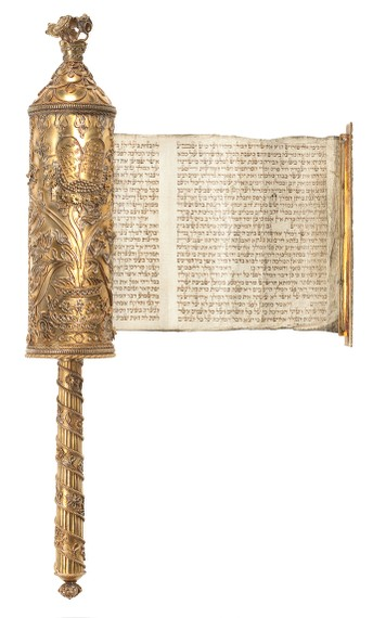 Megillat Esther ; Esther Scroll